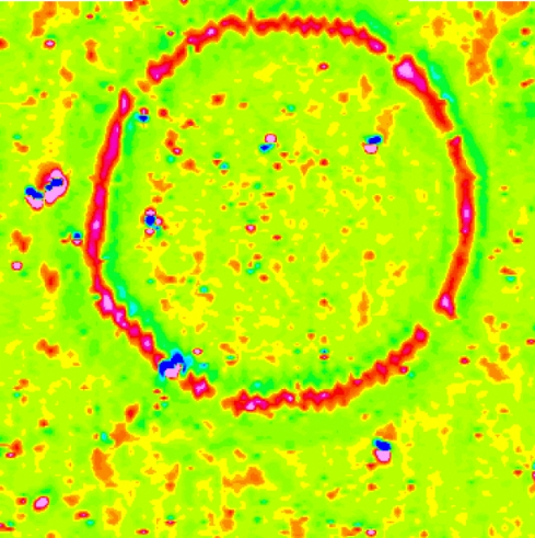 Výsledek použití geofyzikálního měření